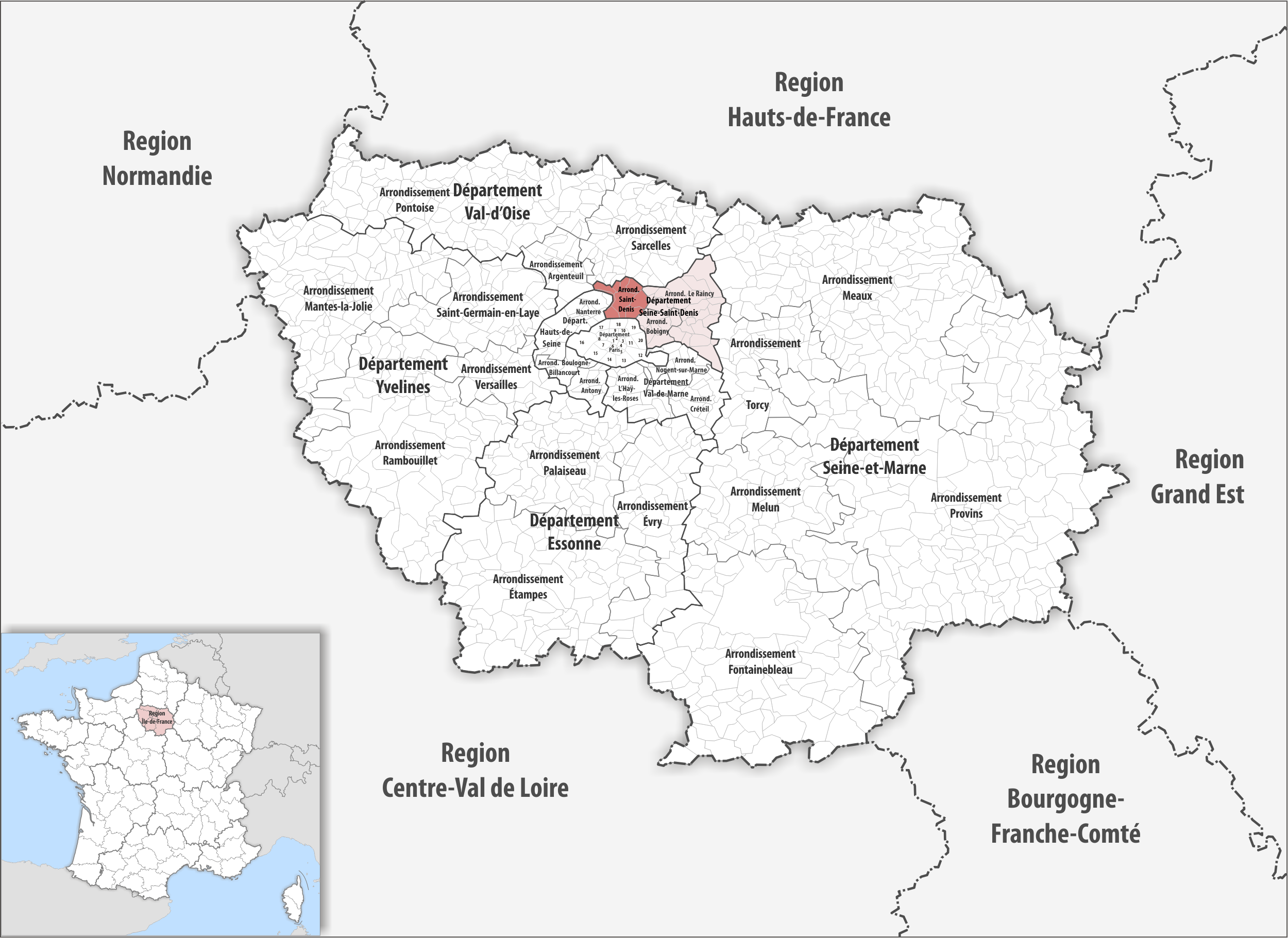 Lage des Arrondissements Saint-Denis